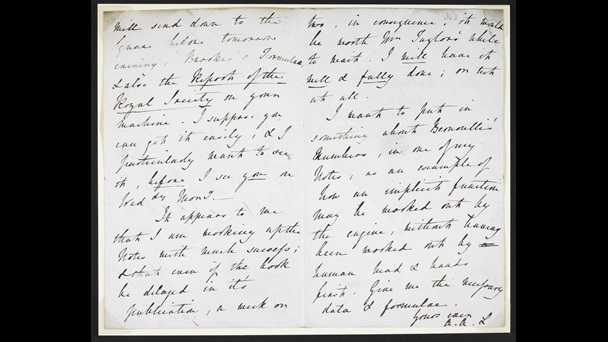 Carta de Ada Lovelace a Charles Babbage onde propón un exemplo de cálculo automatizado.